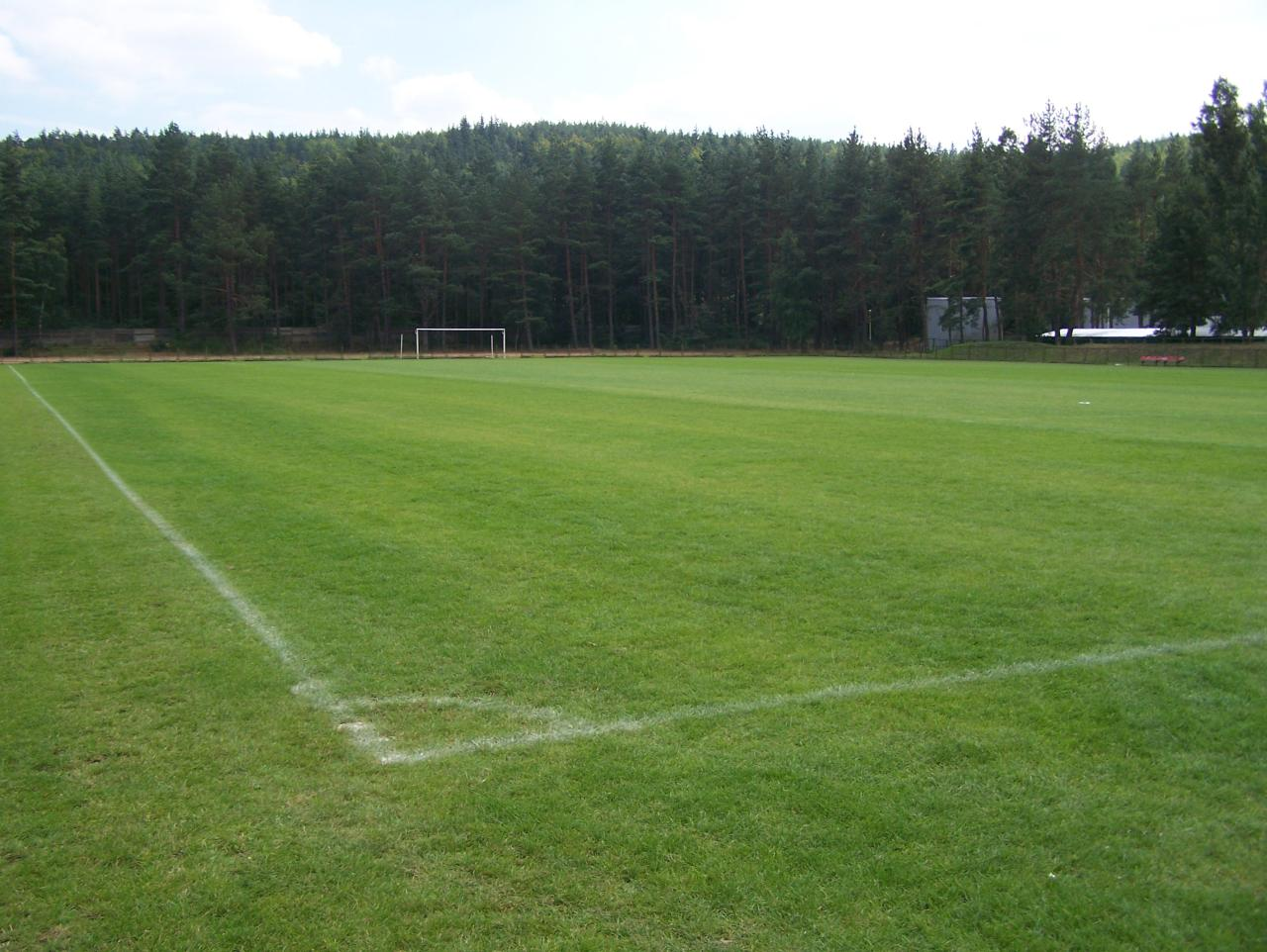 Boczna murawa na stadionie Pogoni Lębork.